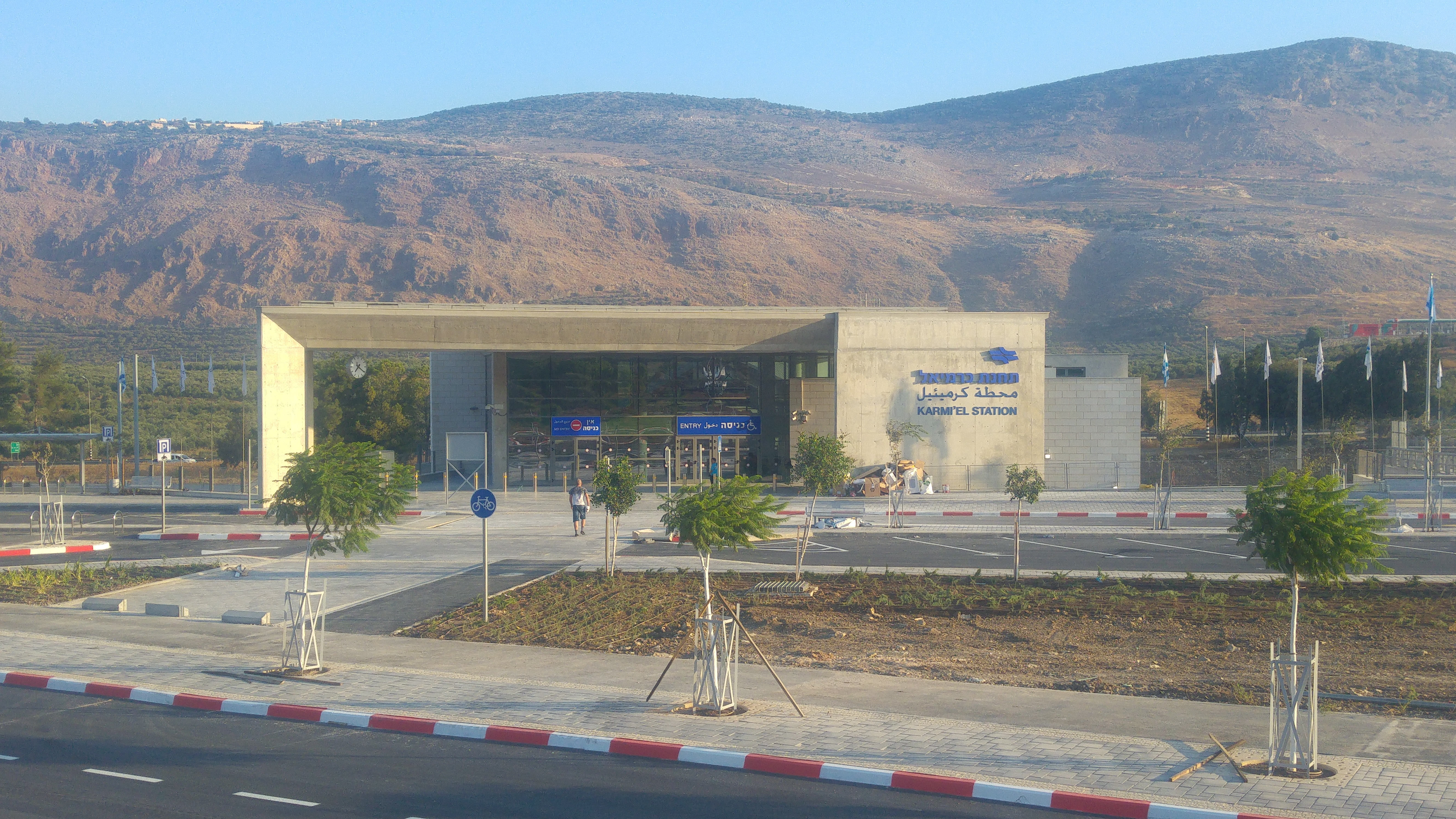 תחנת הרכבת כרמיאל ספטמבר 2017